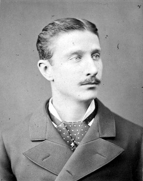 Portrait du Prince impérial en juin 1878.